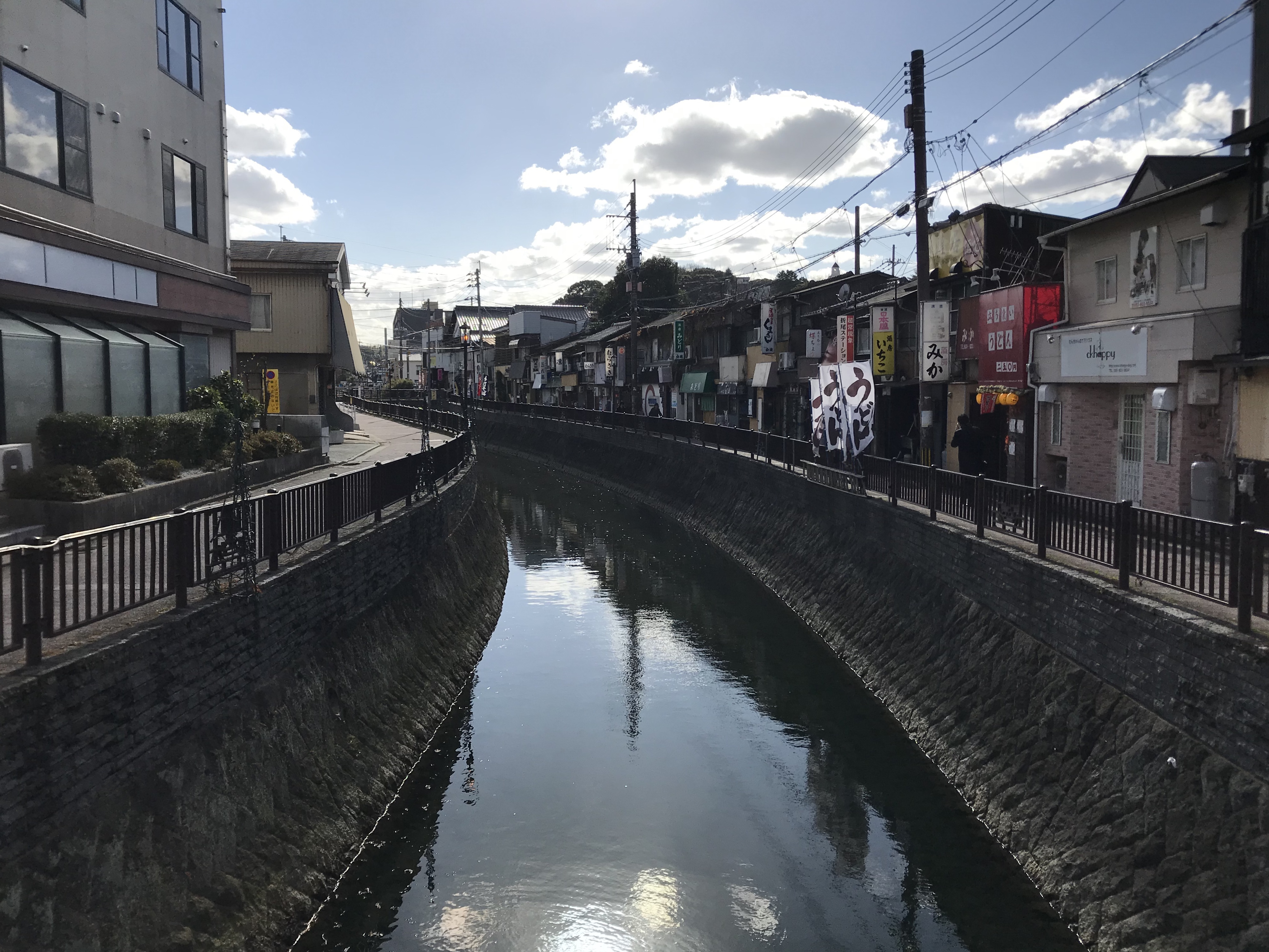 折尾駅東口前の堀川運河